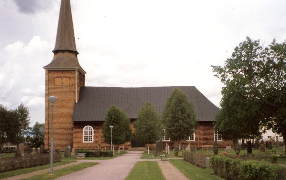 Die Kirche von Norra Ny (Torsby kommun, Värmland, Schweden)